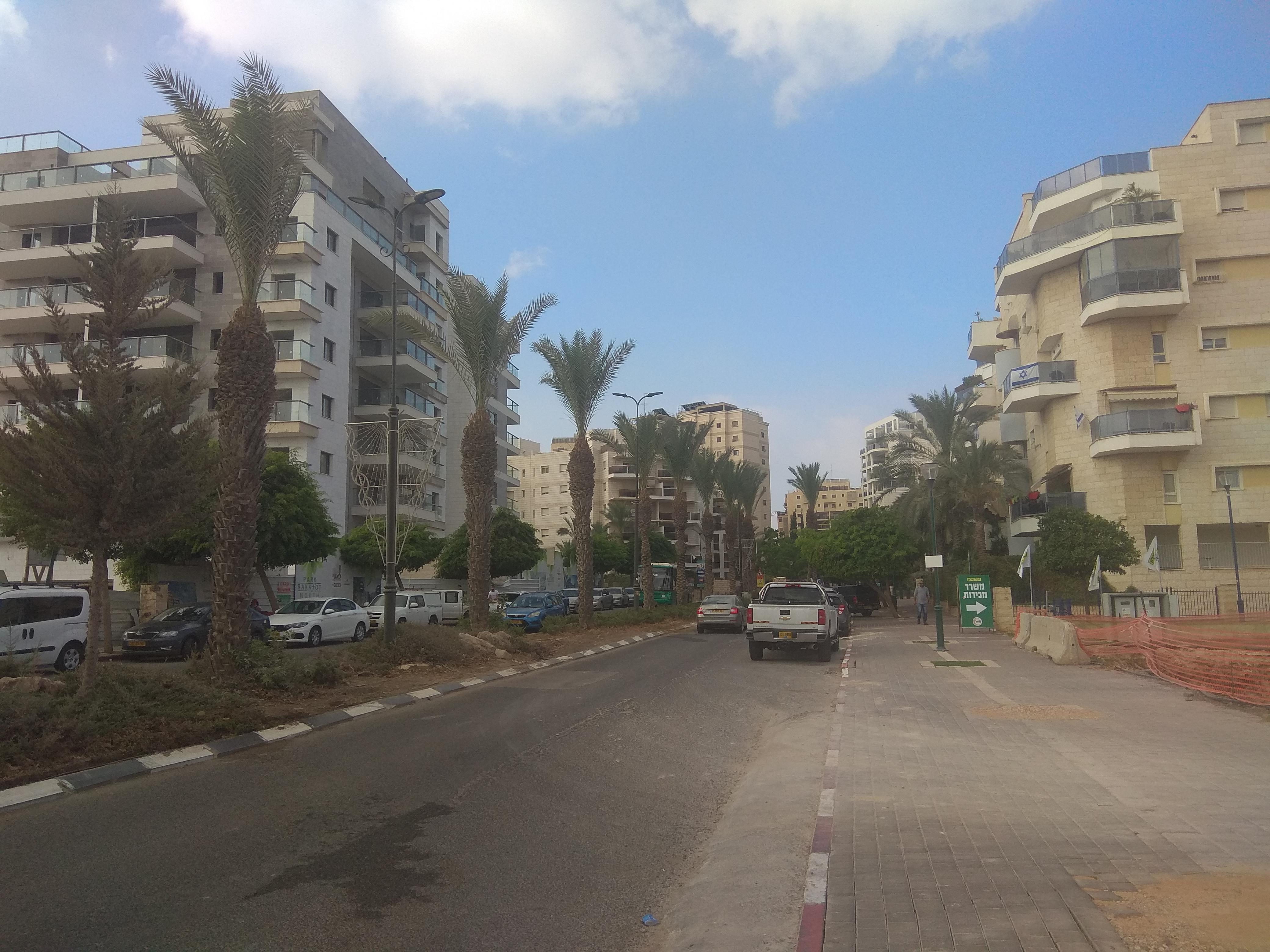 כביש הכניסה לשכונה